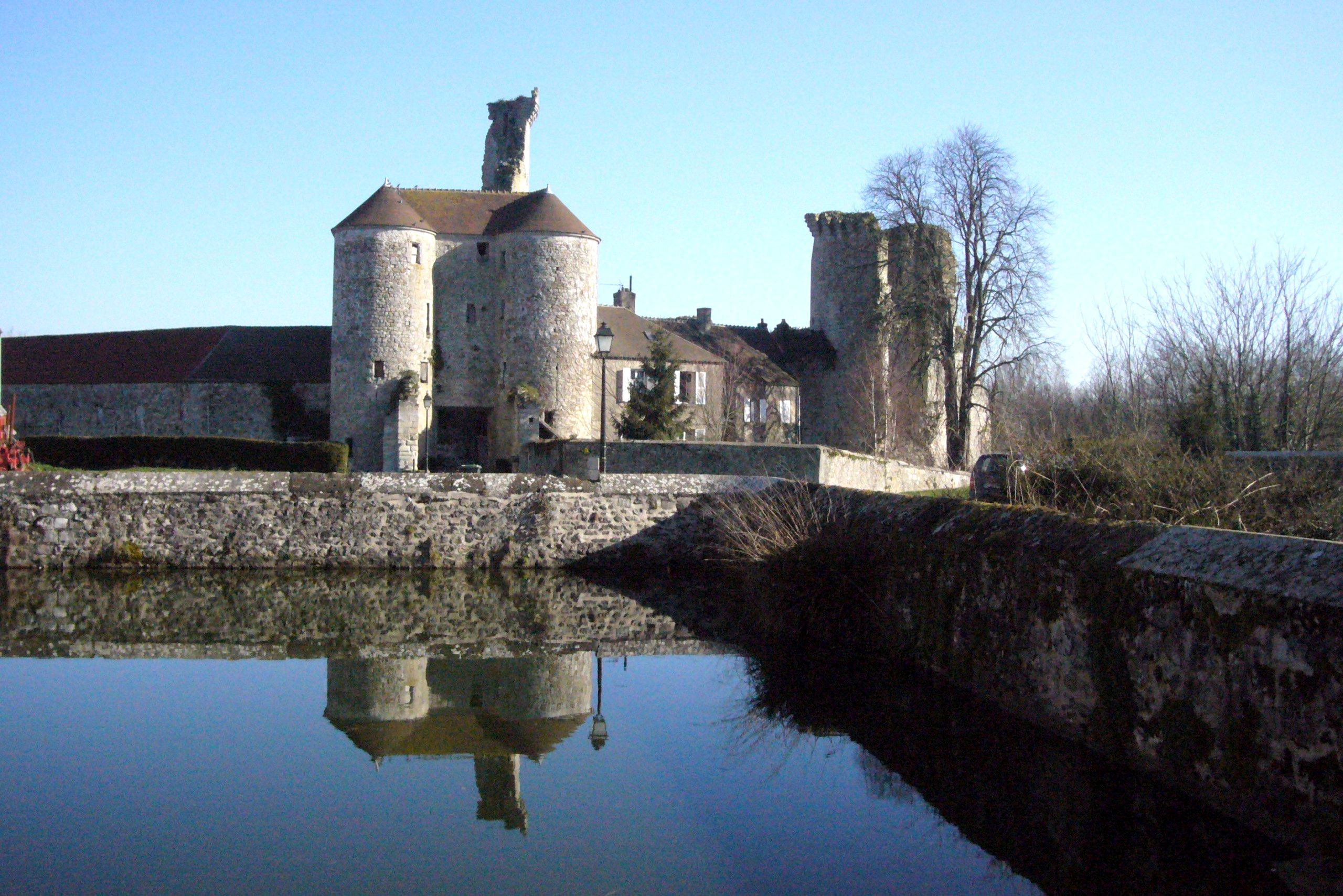 Ruines du château de Montépilloy, aujourd'hui ferme, avec le haut et mince éperon du donjon au milieu et l'abreuvoir au premier plan.